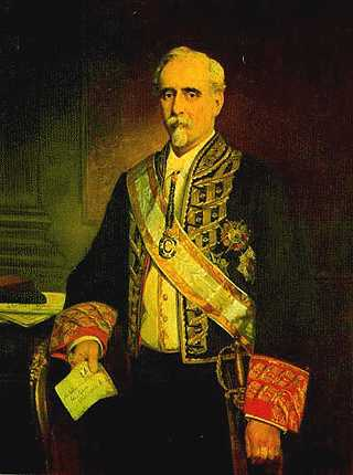 Retrato del político y periodista español Fernando Cos-Gayón (1825-1898), que fue ministro de Hacienda durante el reinado de Alfonso XII y también ministro de Justicia, de Gobernación y de Hacienda durante la regencia de la reina María Cristina de Habsburgo-Lorena, viuda de Alfonso XII y madre de Alfonso XIII.